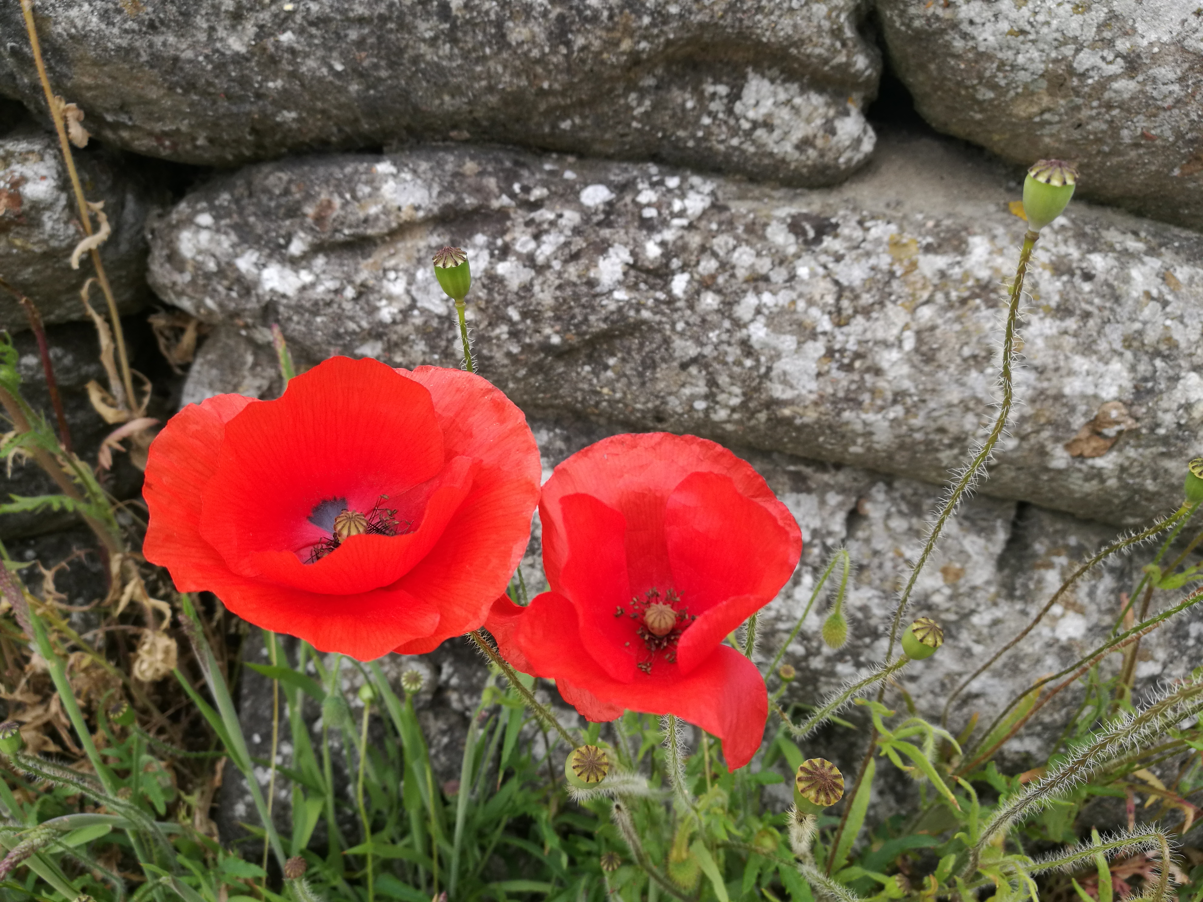 Poppies tussen de loopgraven, Dodengang, Ijzerdijk 62 8600 Diksmuide This photo of immovable heritage has been taken in the Flemish Region